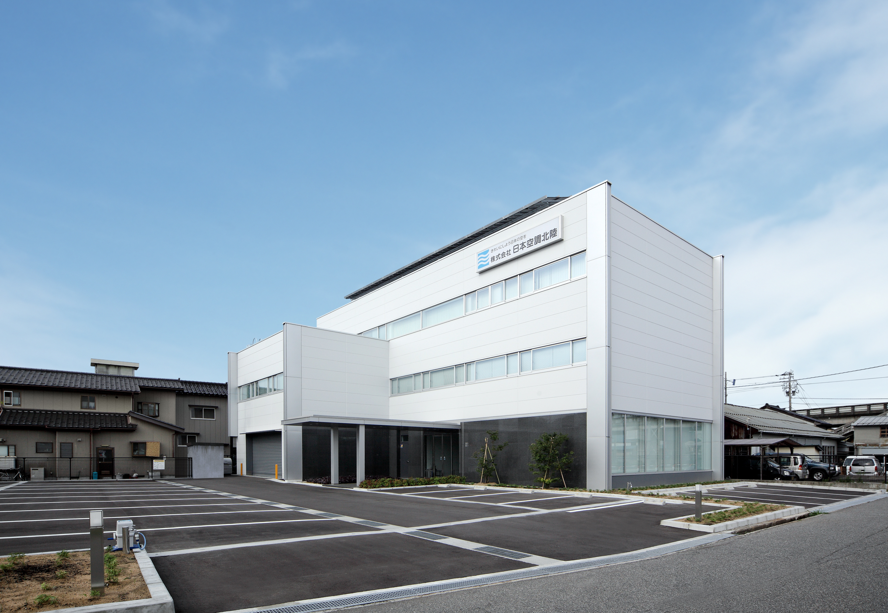 日本空調北陸本社ビル